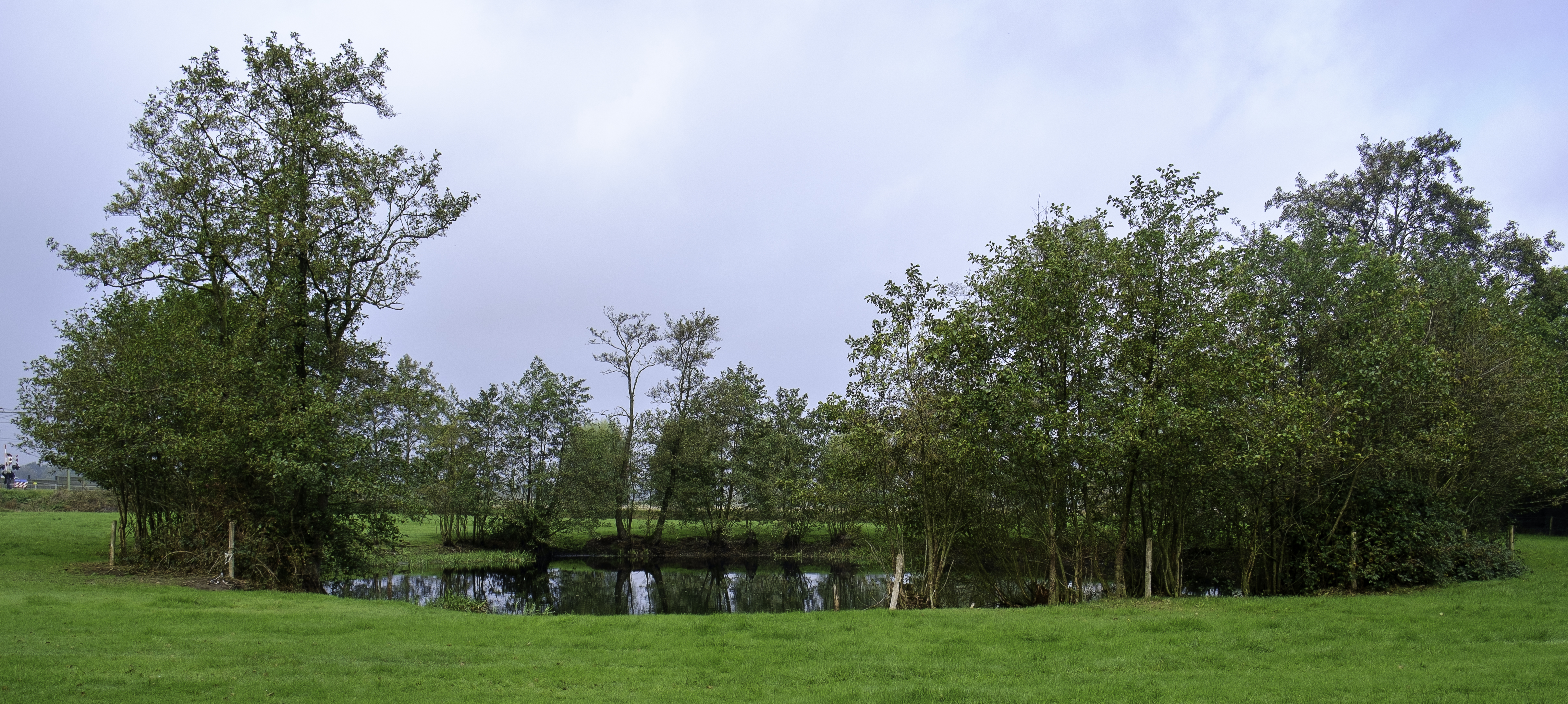 Vijver van de vroegere Embdaborg